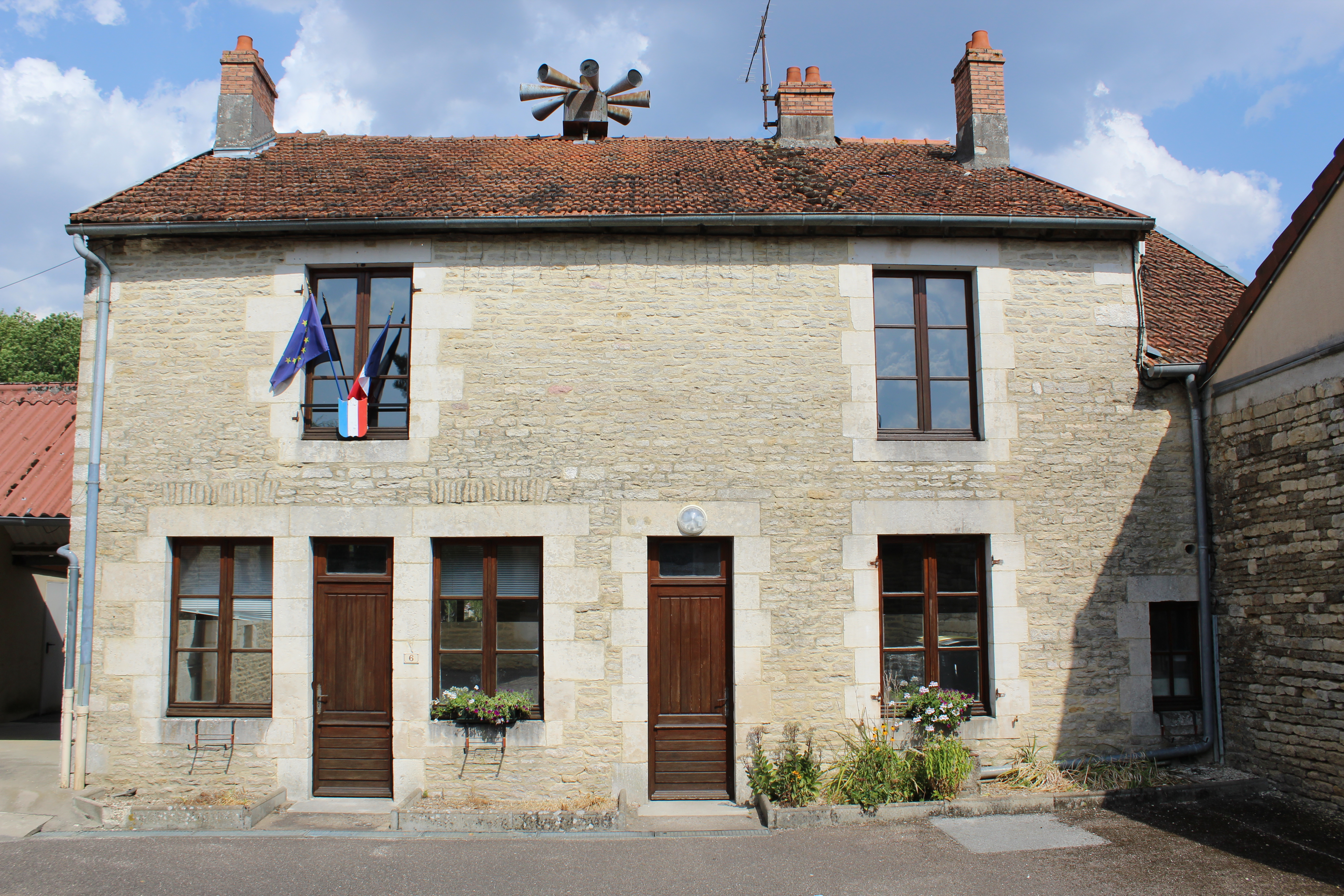 La mairie